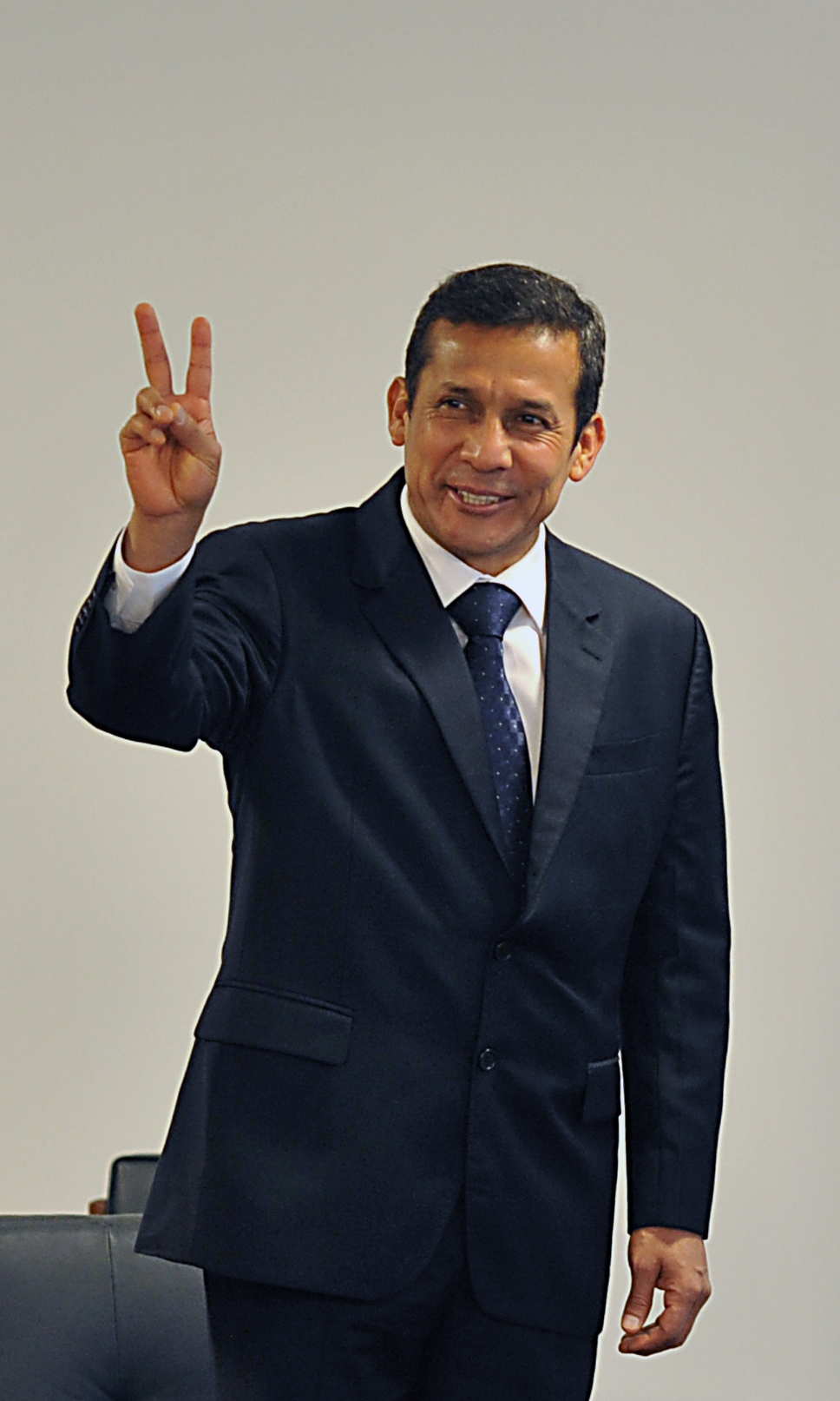 O presidente eleito do Peru Ollanta Humala